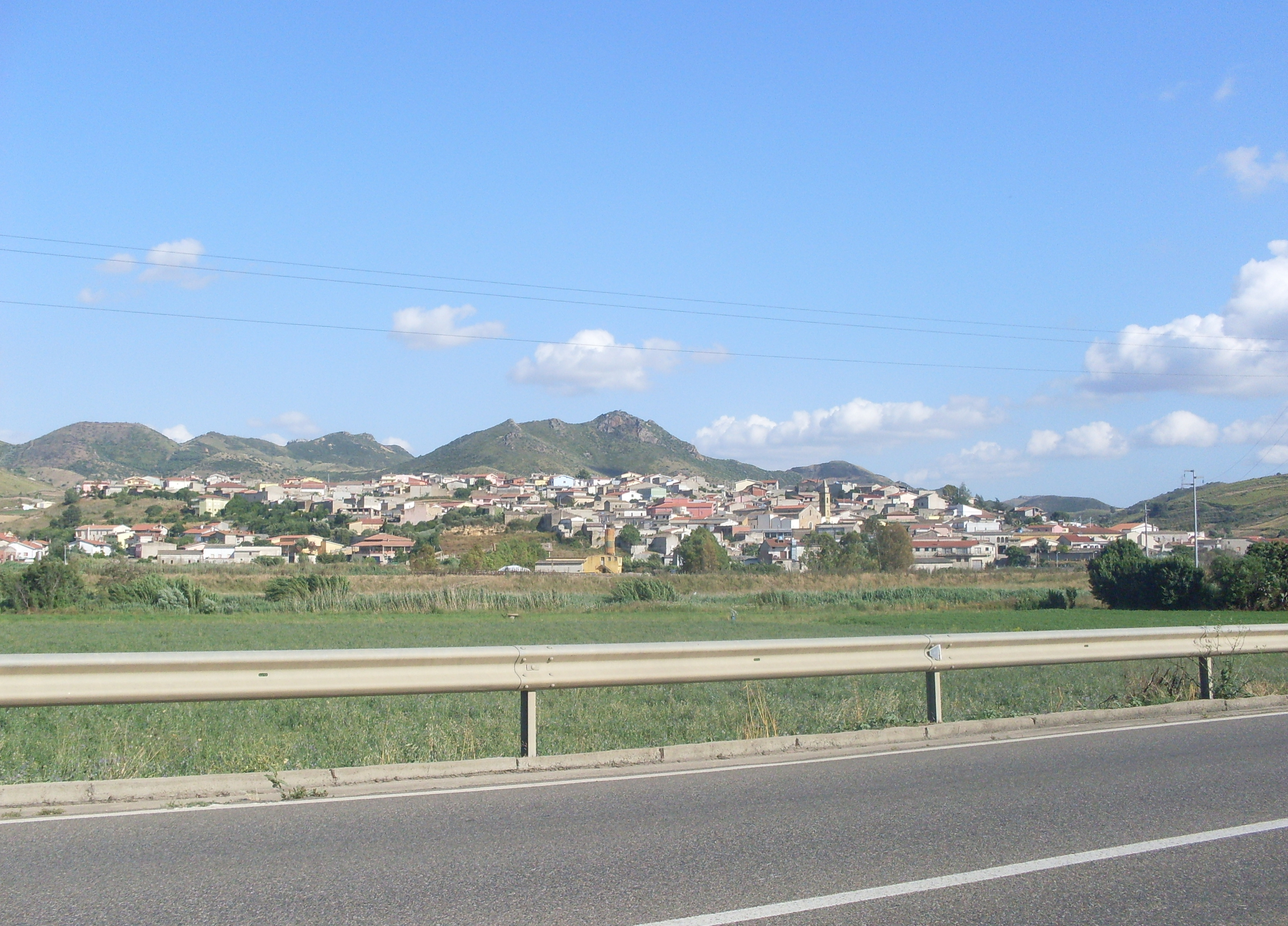 Panorama